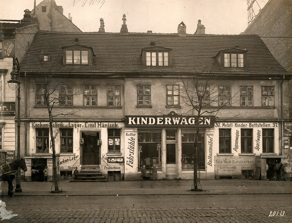 Berlin, Foto aus der Zeit des U-Bahn-Baus 1907–1915; ca. 28 x 23 cm. Mit Datum rechts unten. Berlin, Chausseestraße 37 (Korkenfabrik Ernst Hänsisch und Kinderwagen-Geschäft)